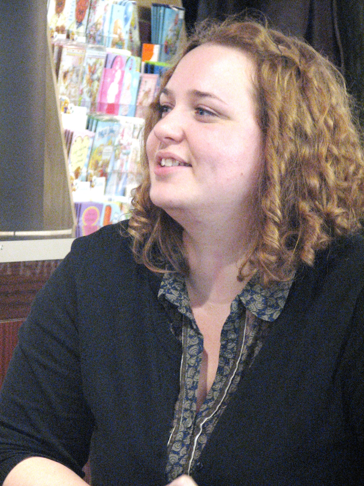 Bibi Raid Viru Keskuse Rahva Raamatu kaupluses noorte fantaasiakirjanduse vestlusringis